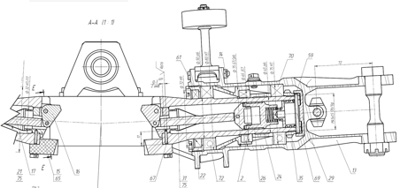 Втулка НВ